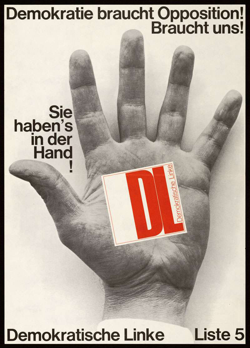 Plakat der Demokratischen Linken zur Landtagswahl in Baden-Württemberg 1968